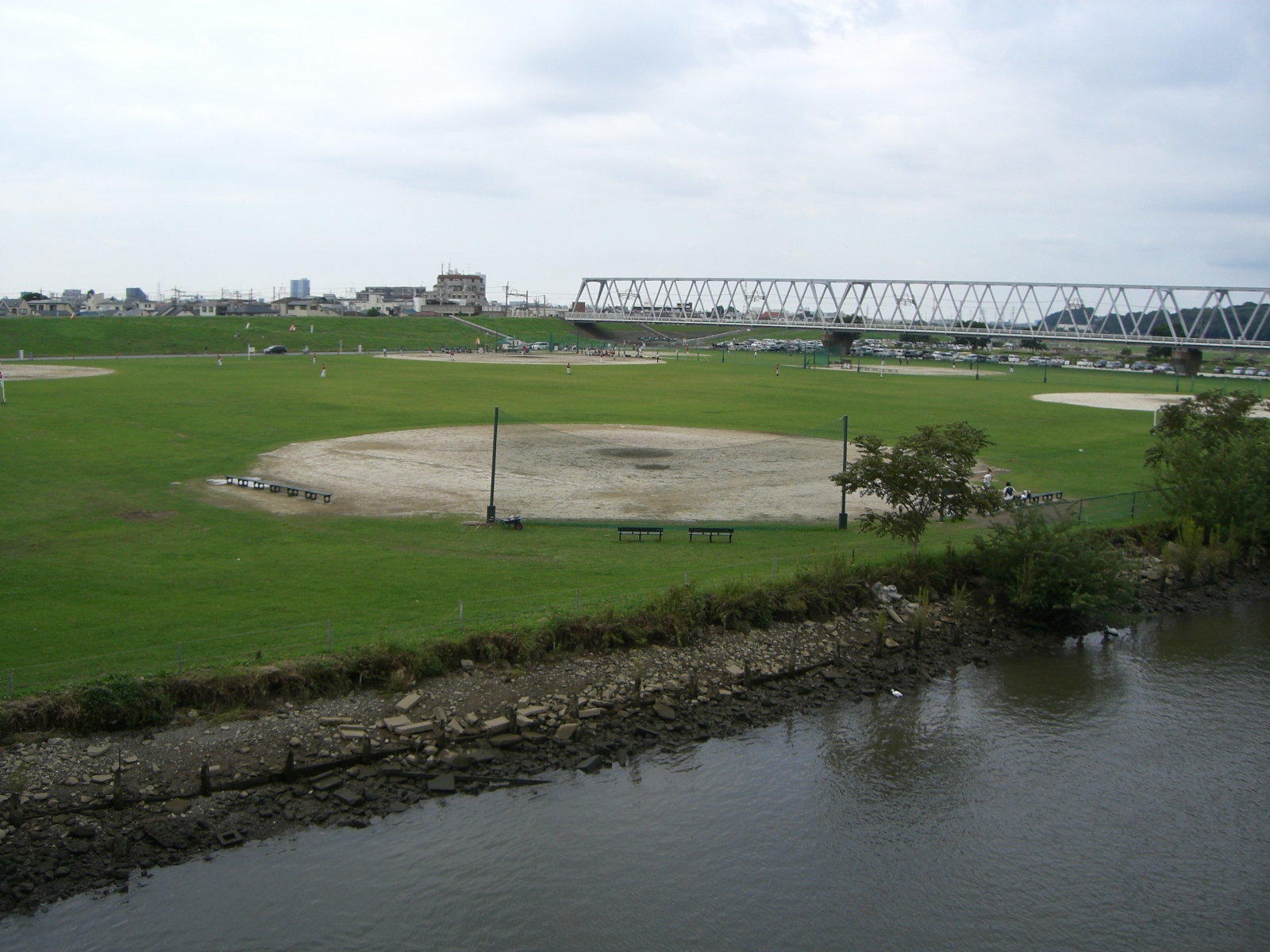 小岩市川関所跡（北小岩三丁目地先河川敷）